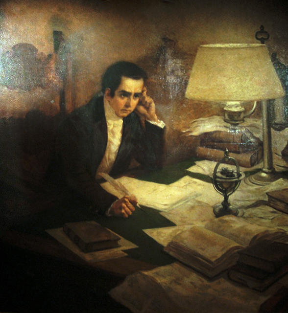 Mariano Moreno (Buenos Aires, 23 de septiembre de 1778 - Alta mar, 4 de marzo de 1811), fue un abogado, periodista y político de las Provincias Unidas del Río de la Plata, actual Argentina. Tuvo un rol decisivo en la Revolución de Mayo.